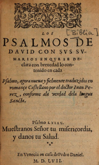 Los Psalmos de David, 1557